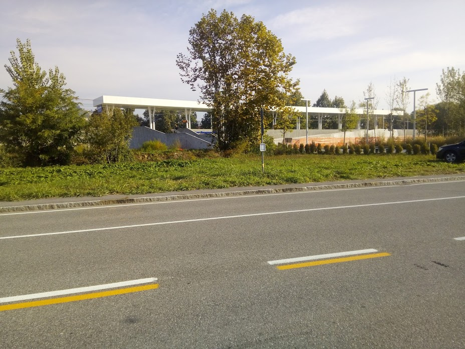 foto scattata da MikkoGambaIT